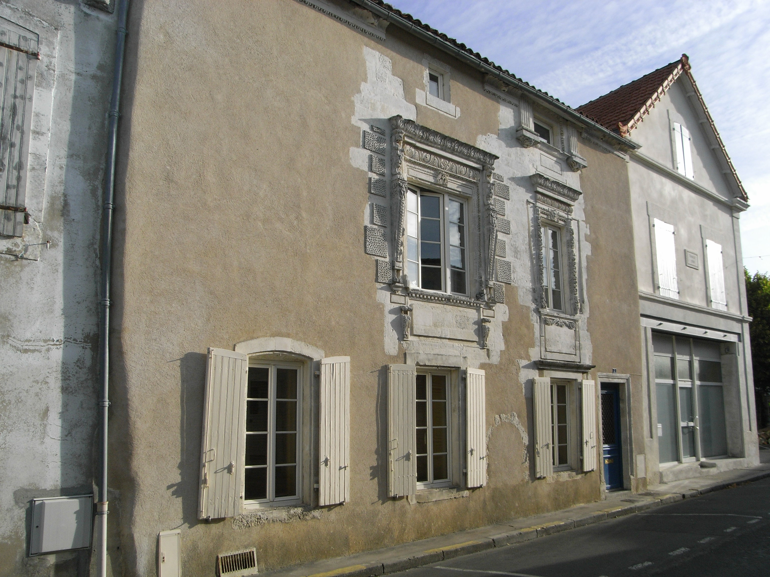 Maison ancienne à La Jarrie en Charente-Maritime (France).